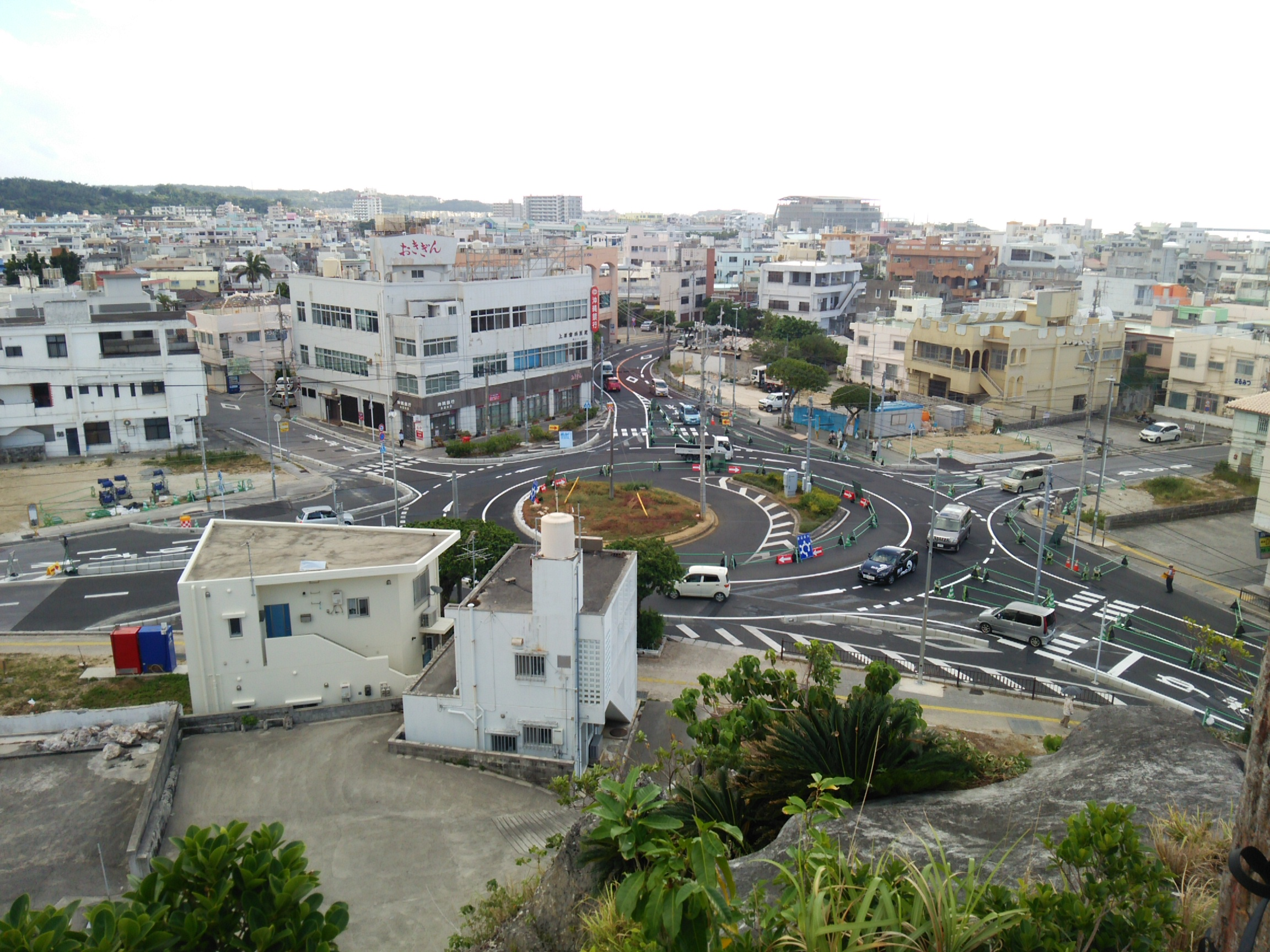 糸満ロータリーラウンドアバウト上から